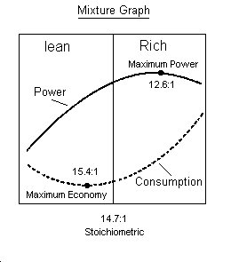 Evolution des dosages air/carburant et influences sur la puissance développée par le moteur.